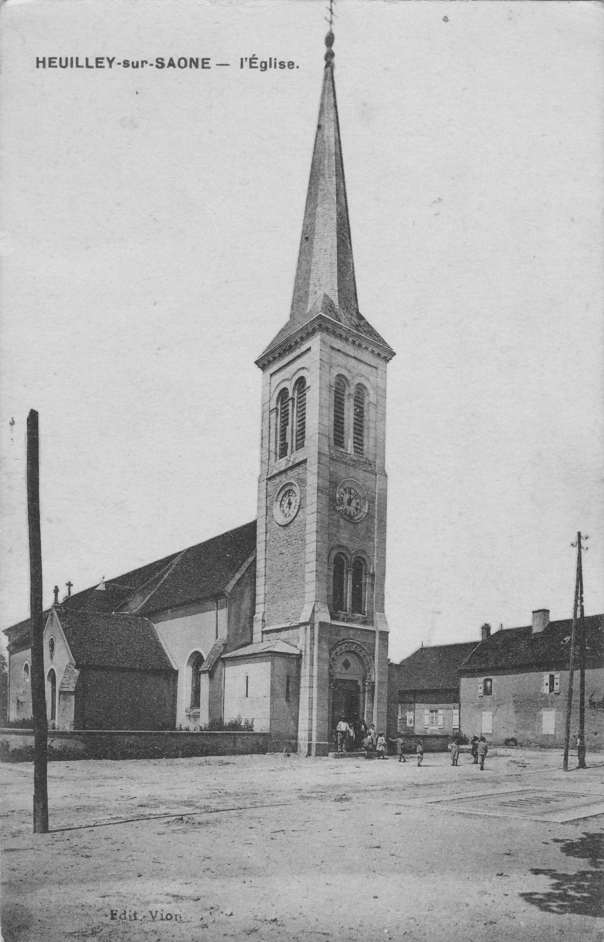 Carte postale ancienne datée de 1921 montrant l'église d'Heuilley-sur-Saône